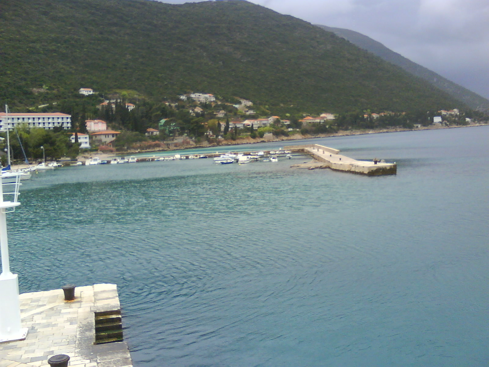 Trpanj